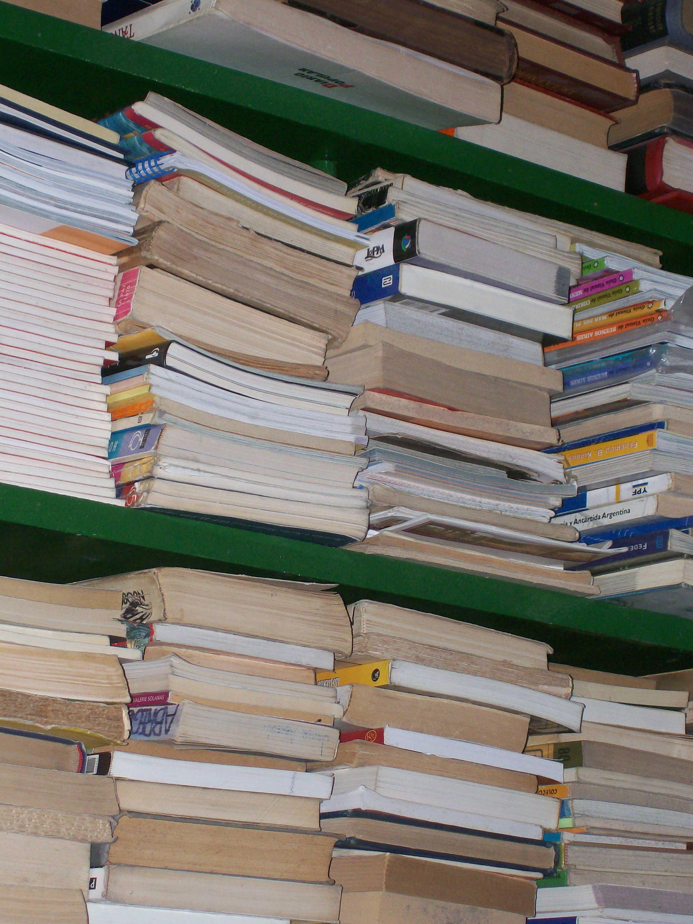 libros apelmazados por todas partes